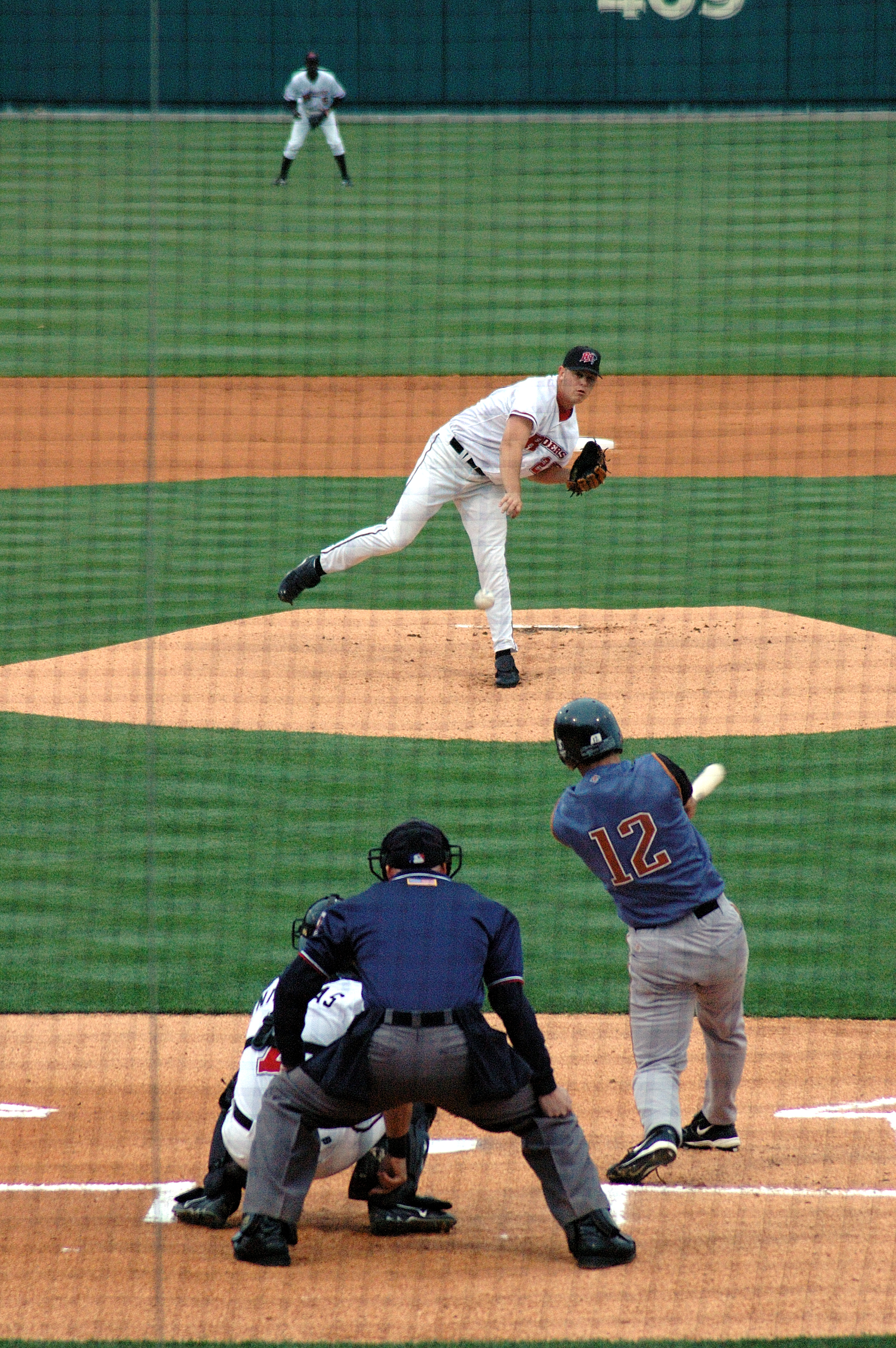 PitcherTulsa vs Frisco